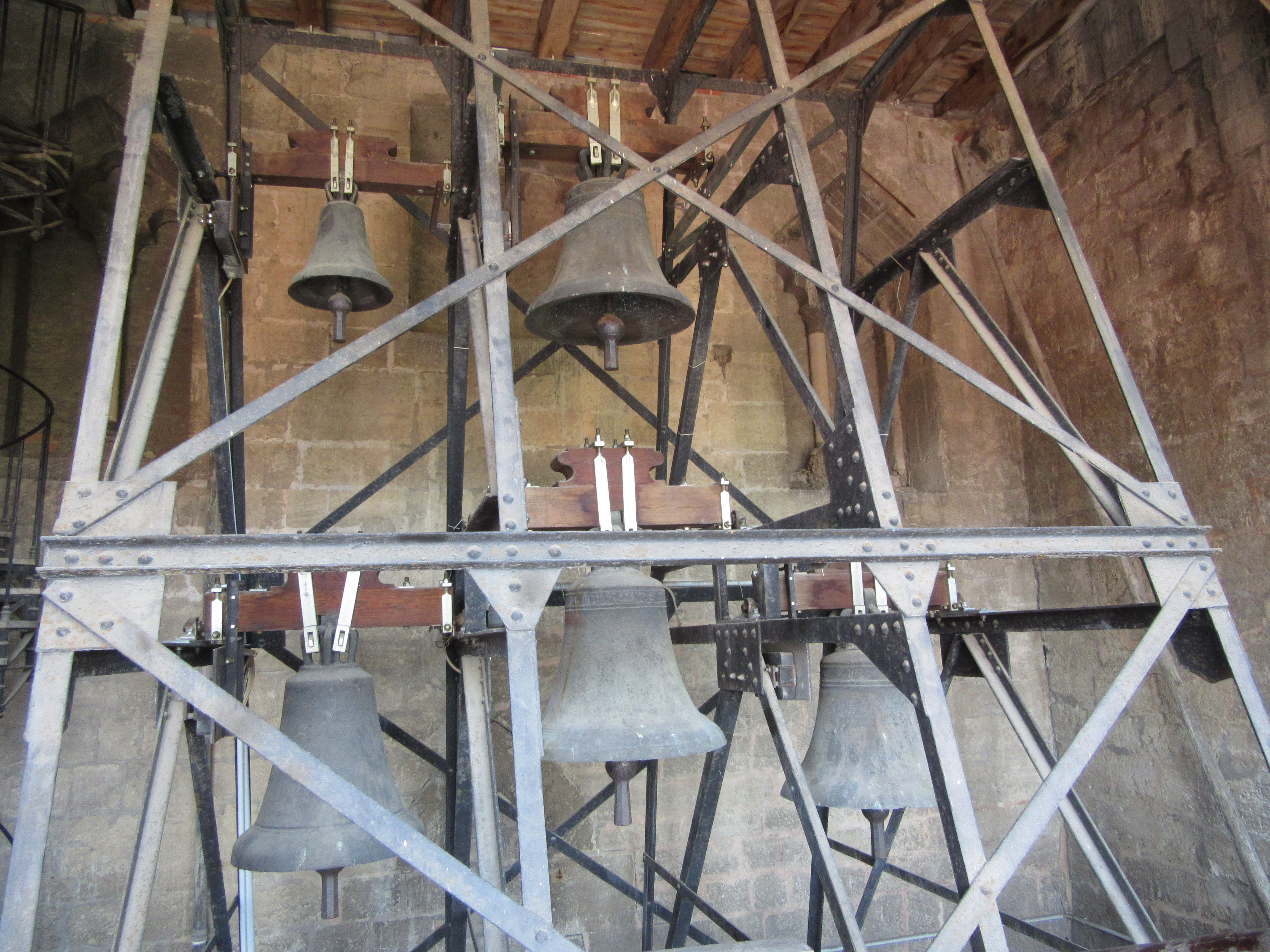 Dom zu Halberstadt, Glocken im Mittelbau